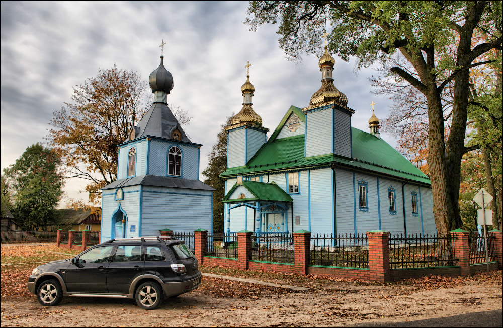 Бездзеж. Царква Прасвятой Тройцы